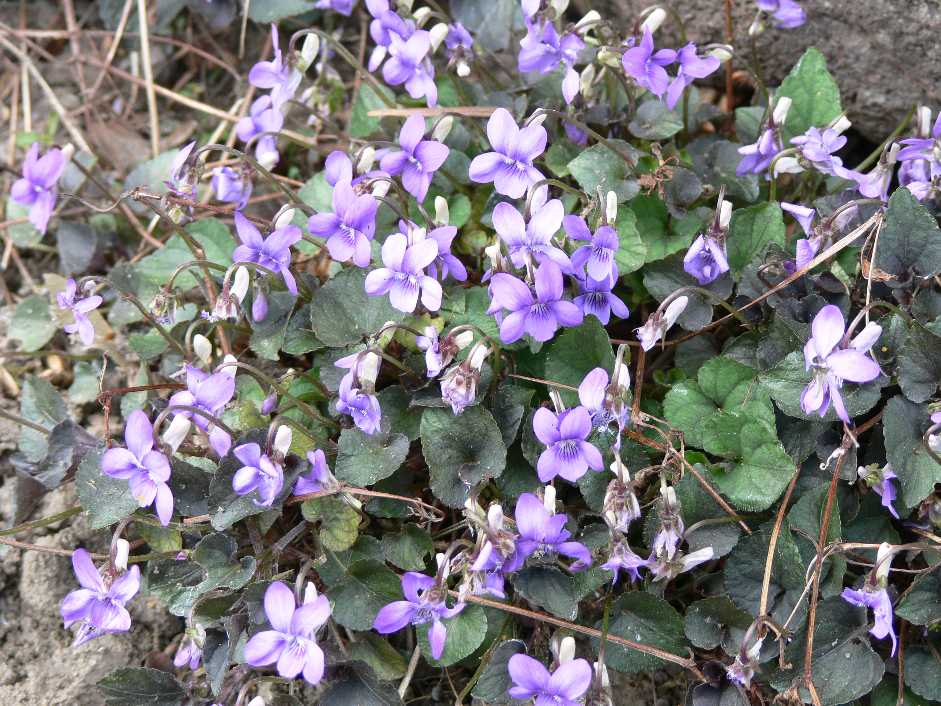 Labrador-Veilchen (Viola labradorica Schrank), Botanischer Garten Krefeld